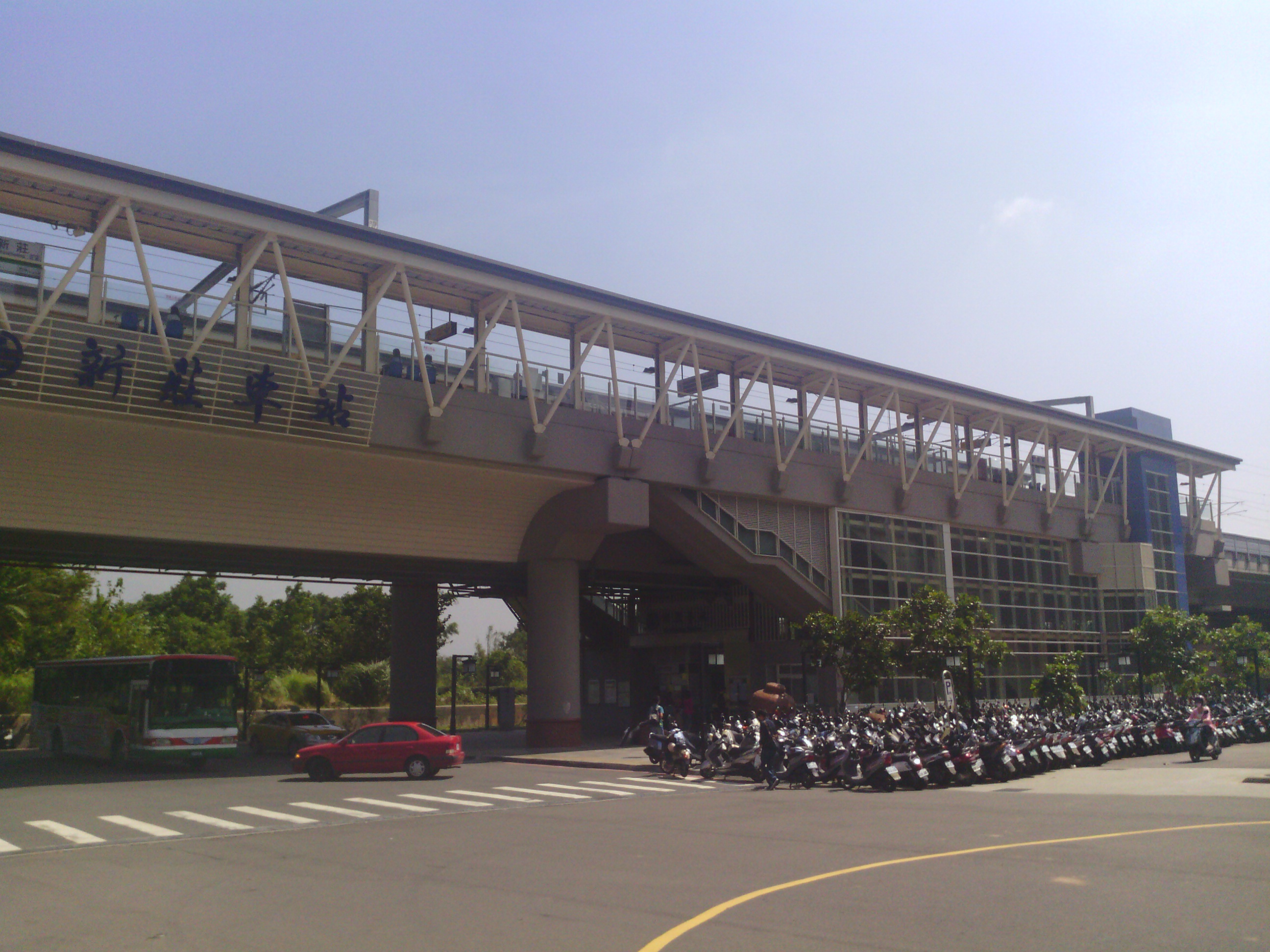 臺灣鐵路管理局新莊車站